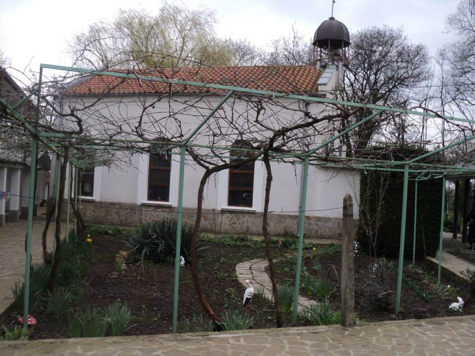 Кабиле